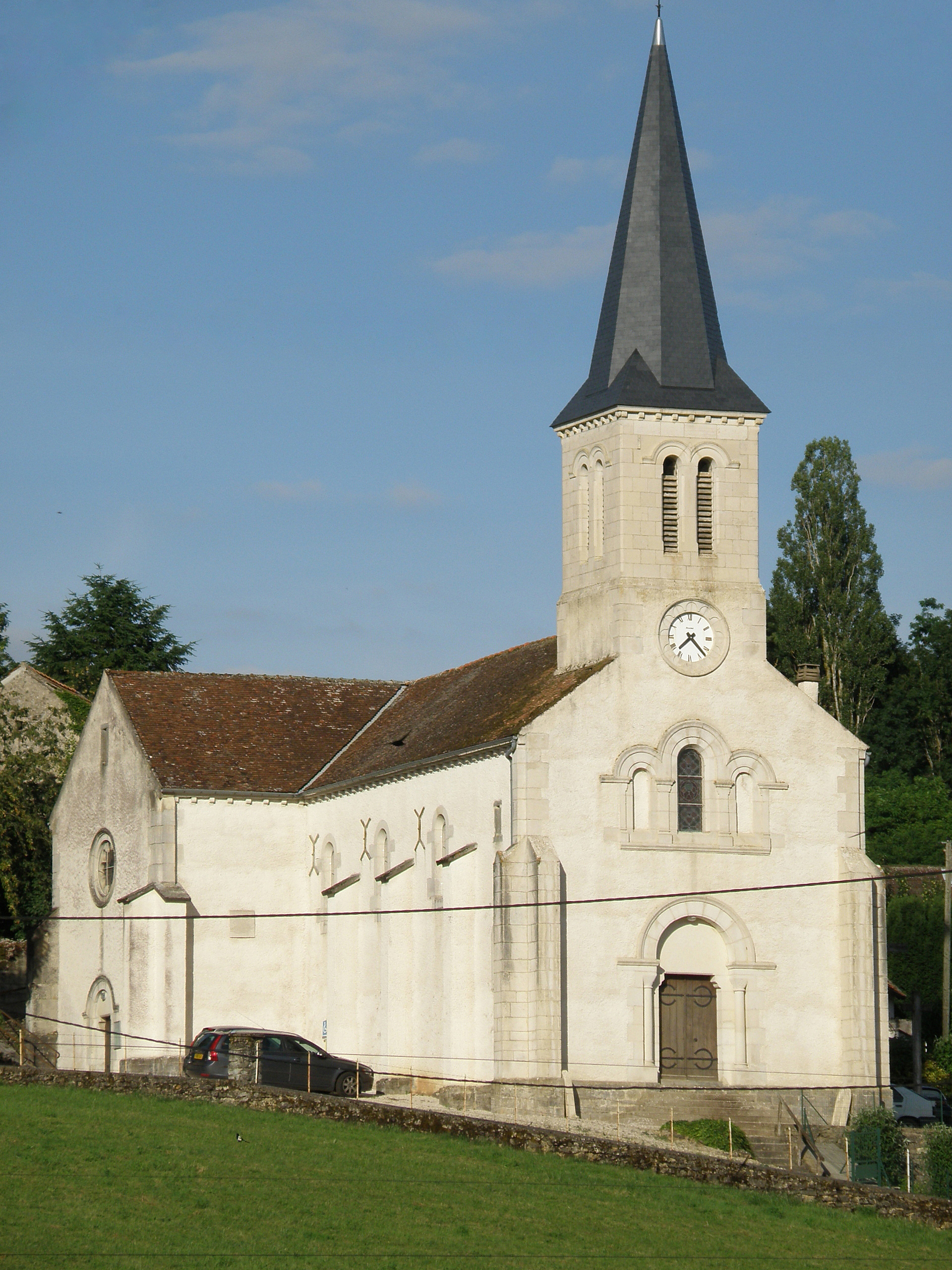 Change (Saône-et-Loire, France). Église Saint-Roch (XXe siècle).